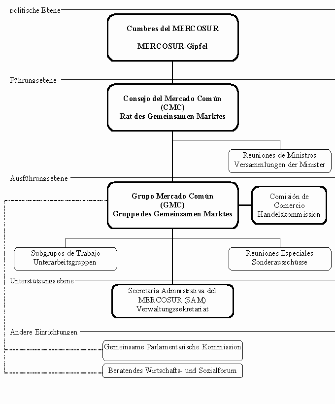 Mercosur und EU - Eine vergleichende Betrachtung des institutionellen und materiellen Rechts